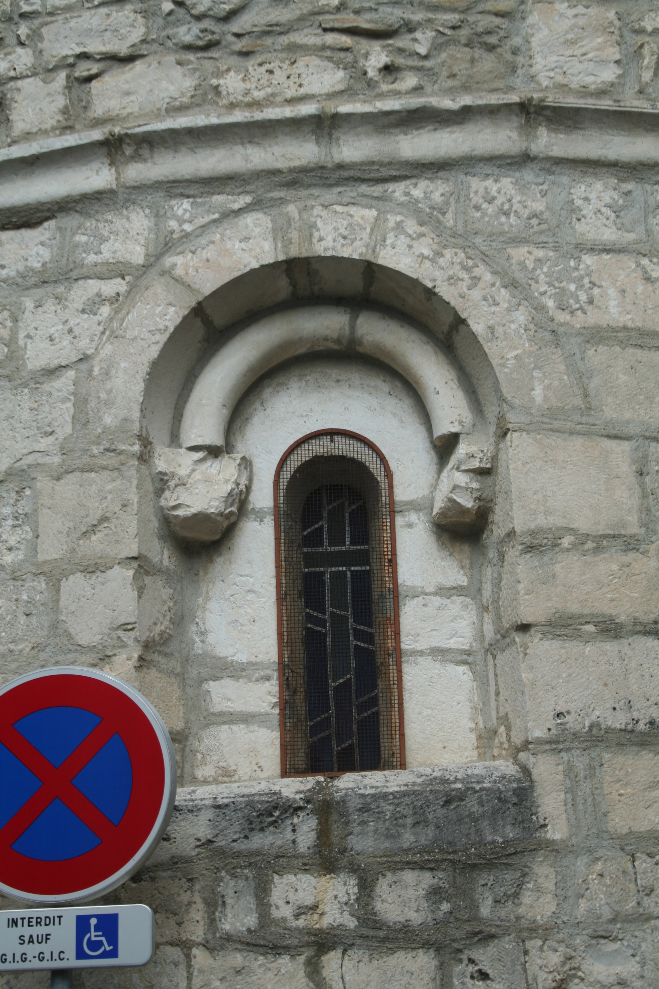 Saint-Privat-des-Vieux (Gard) - fenêtre du chevet de l'église